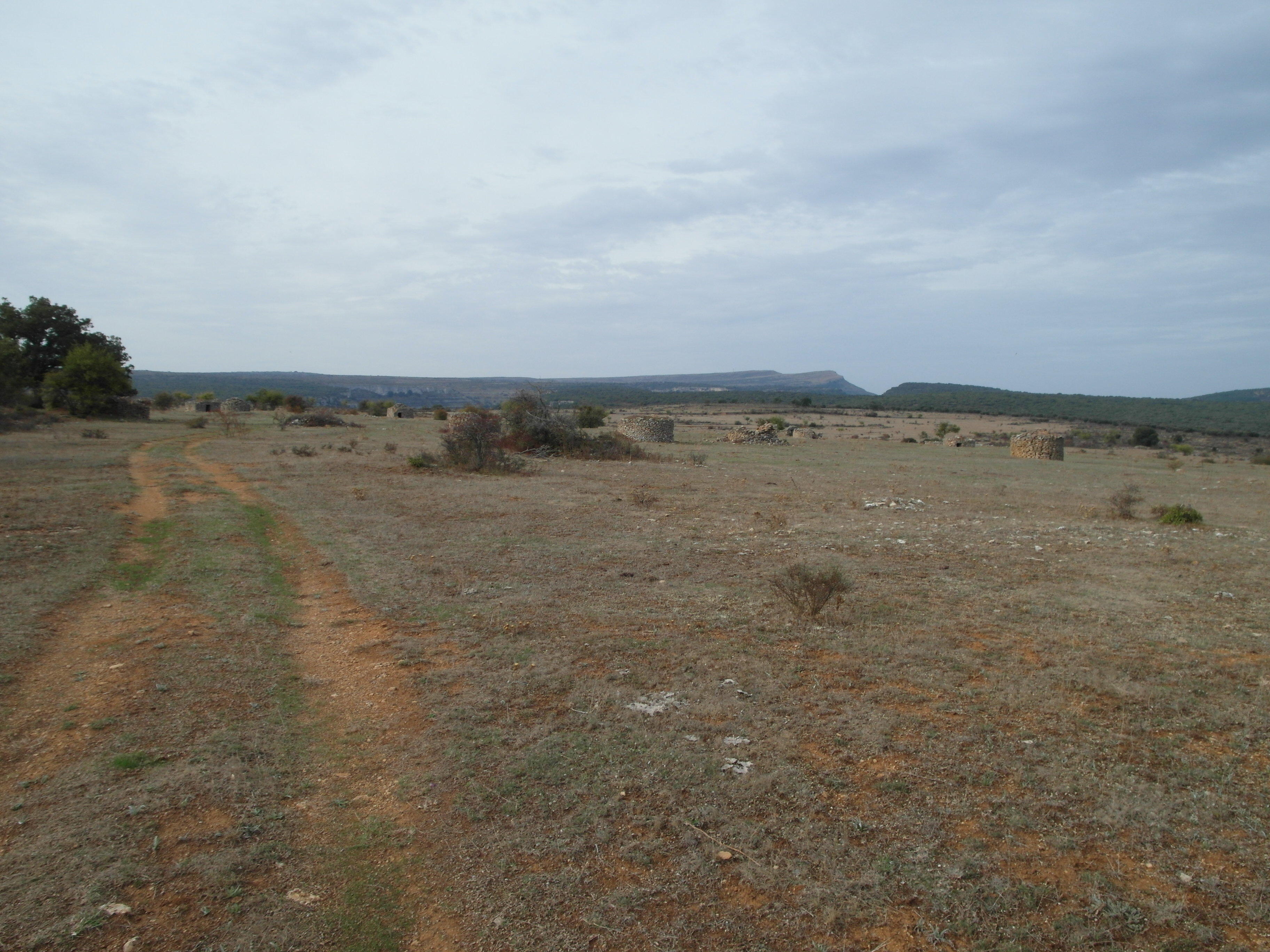 Orbaneja del Castillo, Burgos.